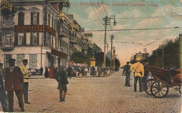 Ростов-на-Дону Большая Садовая улица